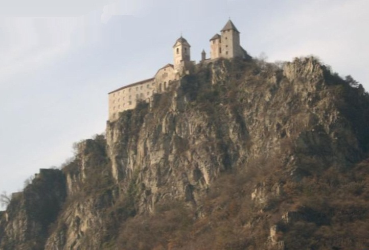 Kloster Säben oberhalb von Klausen